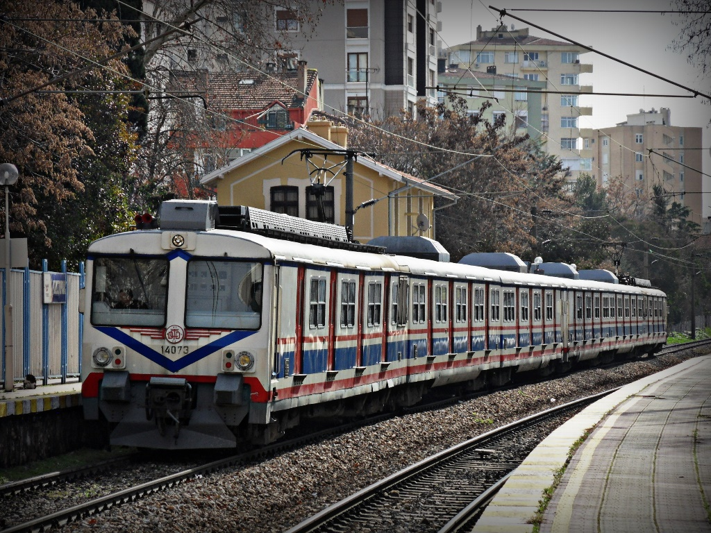 Haydarpaşa banliyösünde eski bir tren seti